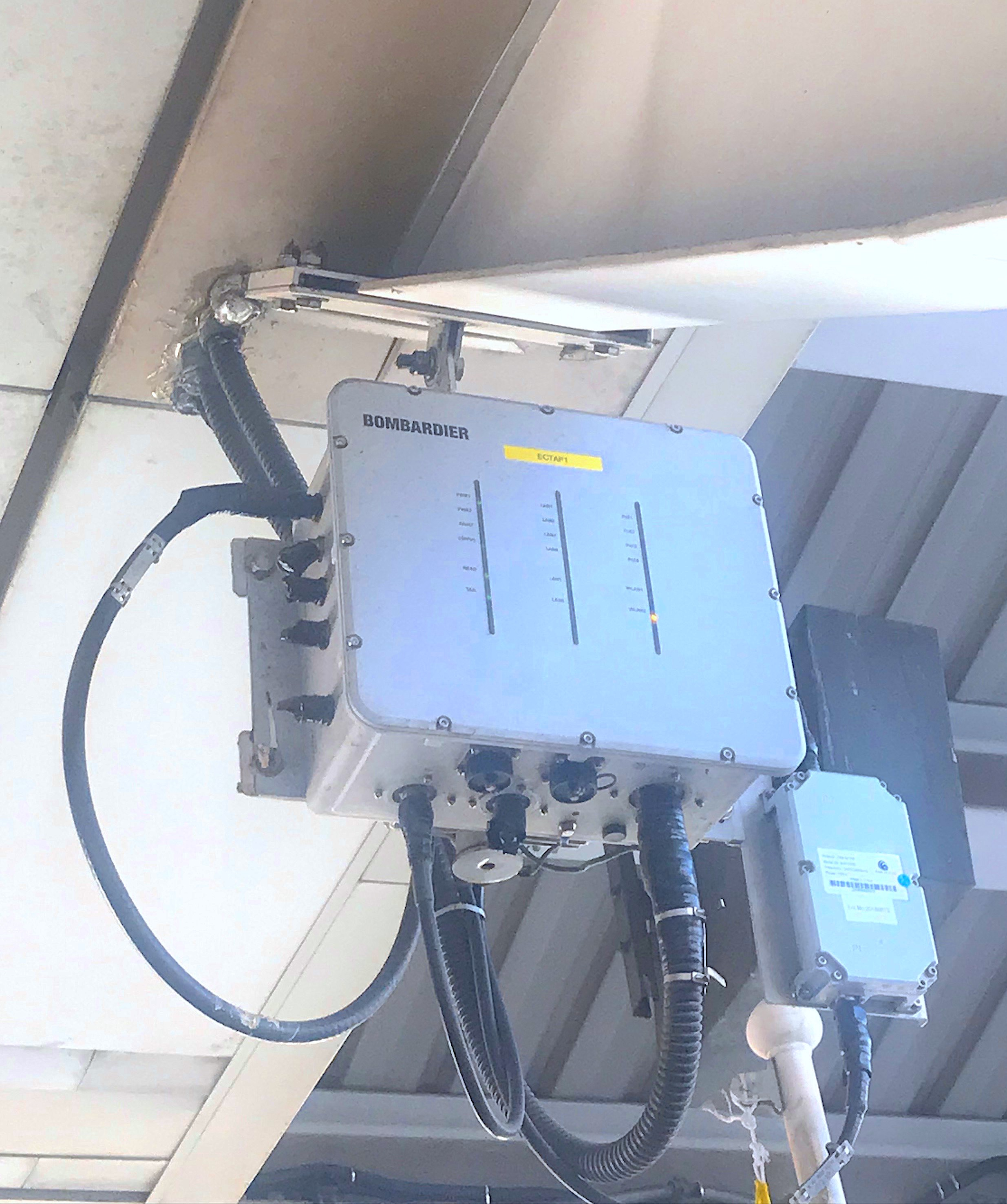 BTS Skytrain Bombadier Box Siam Station Upper Platform Level